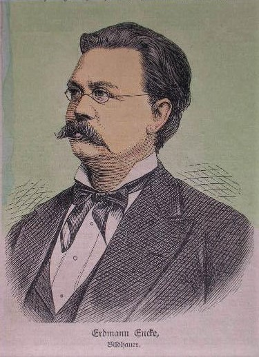 Portrait Erdmann Encke, c. 1880, teilkolorierter Holzstich, ca. 10 x 7,5 cm